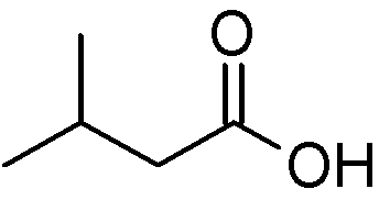 ácido 3-metilbutanoico